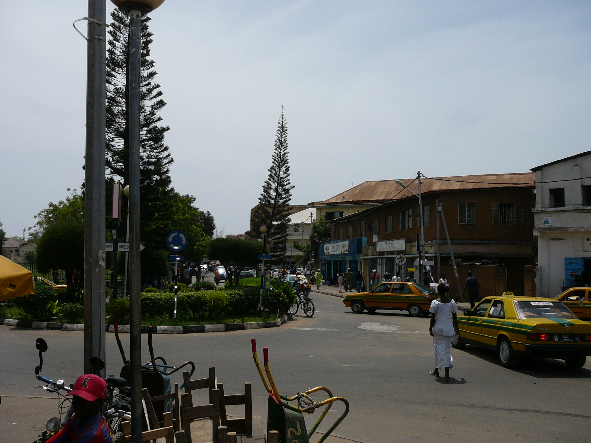 Straße in Banjul